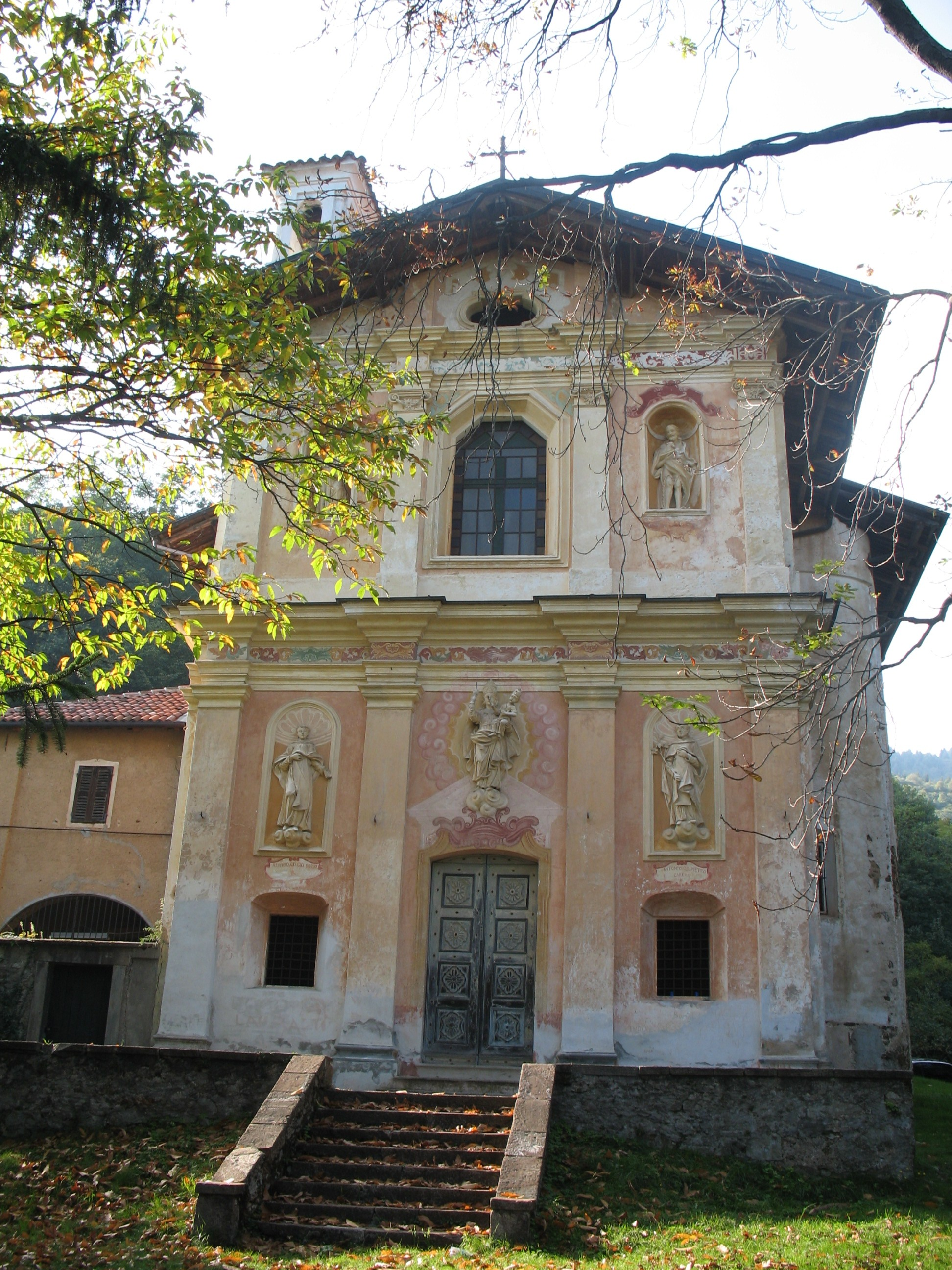 Santuario della Brugarola, ad Ailoche, comune in provincia di Biella, Piemonte, Italia)